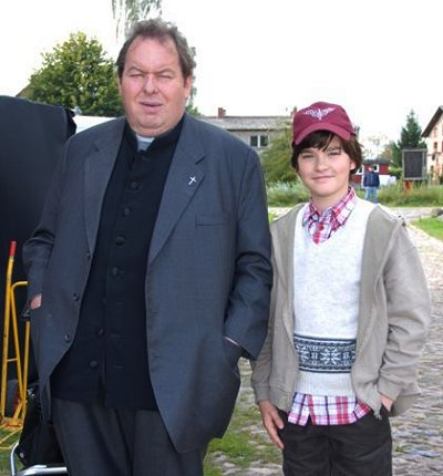 Jungschauspieler Patrick Mölleken neben Ottfried Fischer bei Dreharbeiten zur Folge „Pfarrer Braun - Heiliger Birnbaum“ 2007